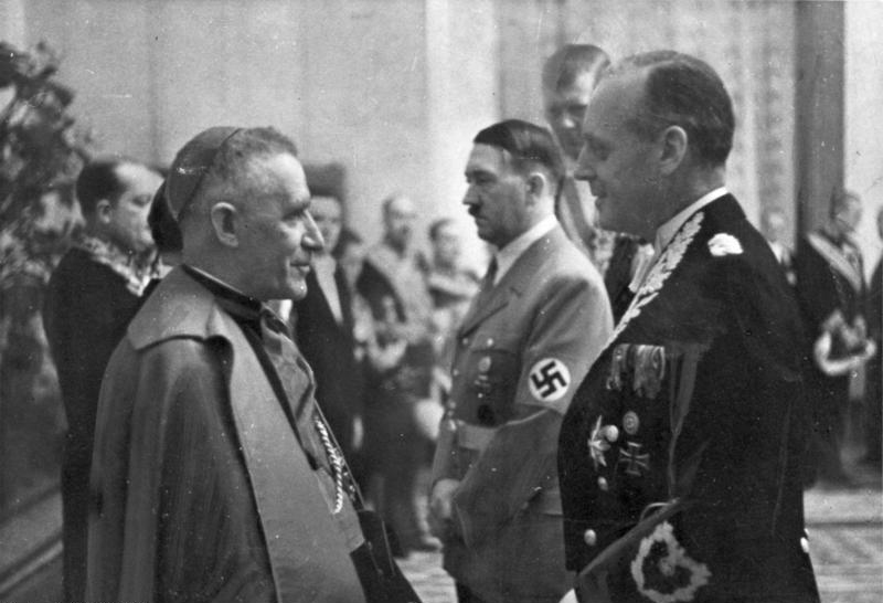 Neujahrsempfang Hitler's in Berlin. - Vorn im Bild: Außenminister von Ribbentrop im Gespräch mit dem Nuntius Orsenigo. Im Hintergrund: Führer und Reichskanzler Adolf Hitler. 511-39